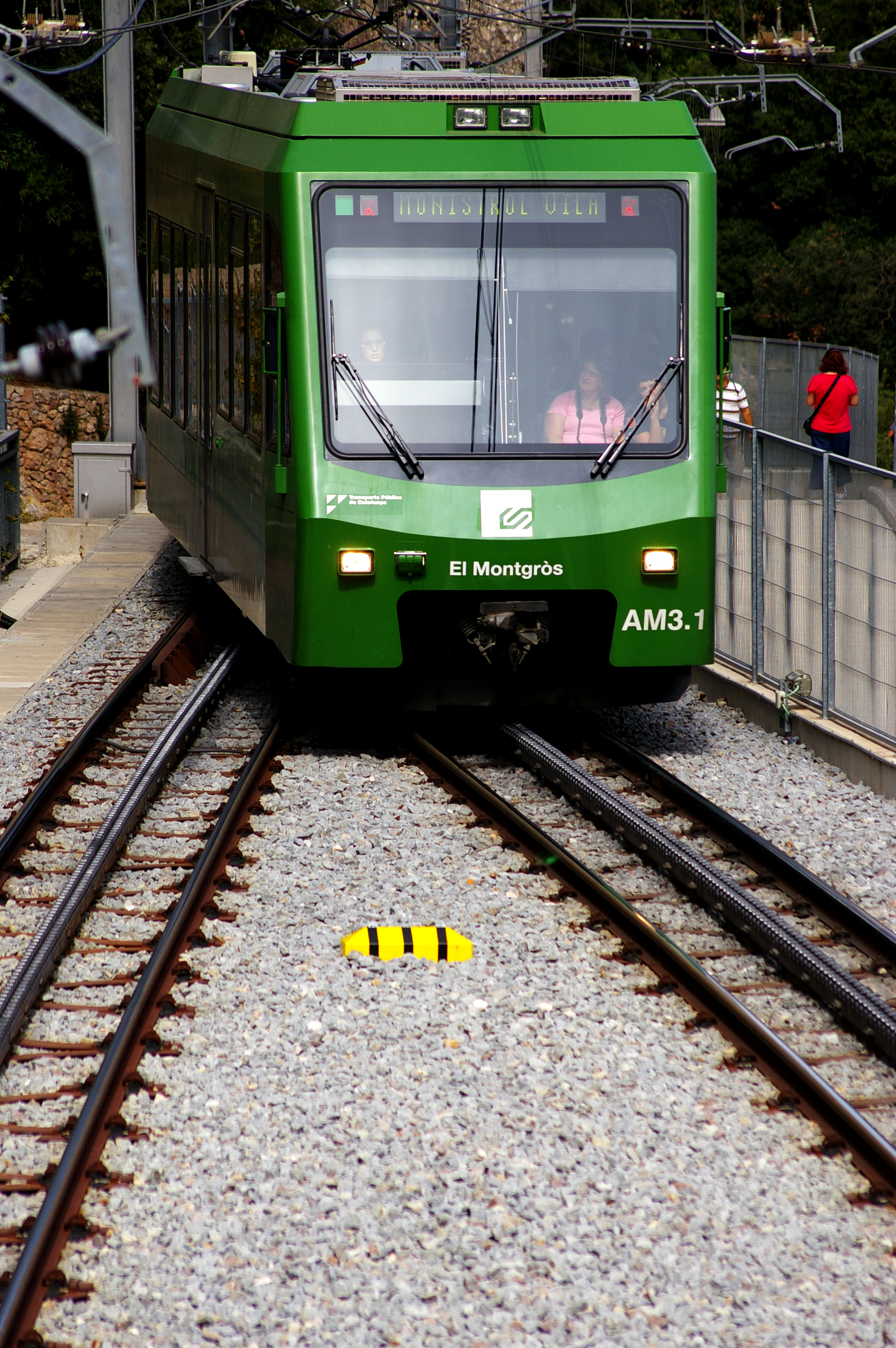 Cremallera de Montserrat (AM3.1 El Montgròs), Ferrocarrils de la Generalitat de Catalunya